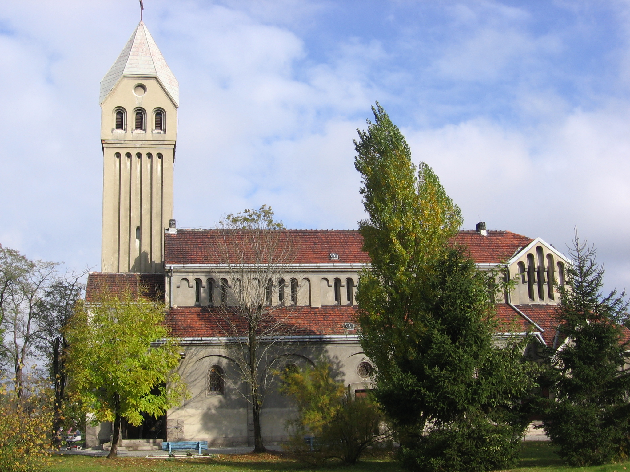 kościół Matki Boskiej Wspomożenia Wiernych we Wrocławiu, ul. Świątnicka